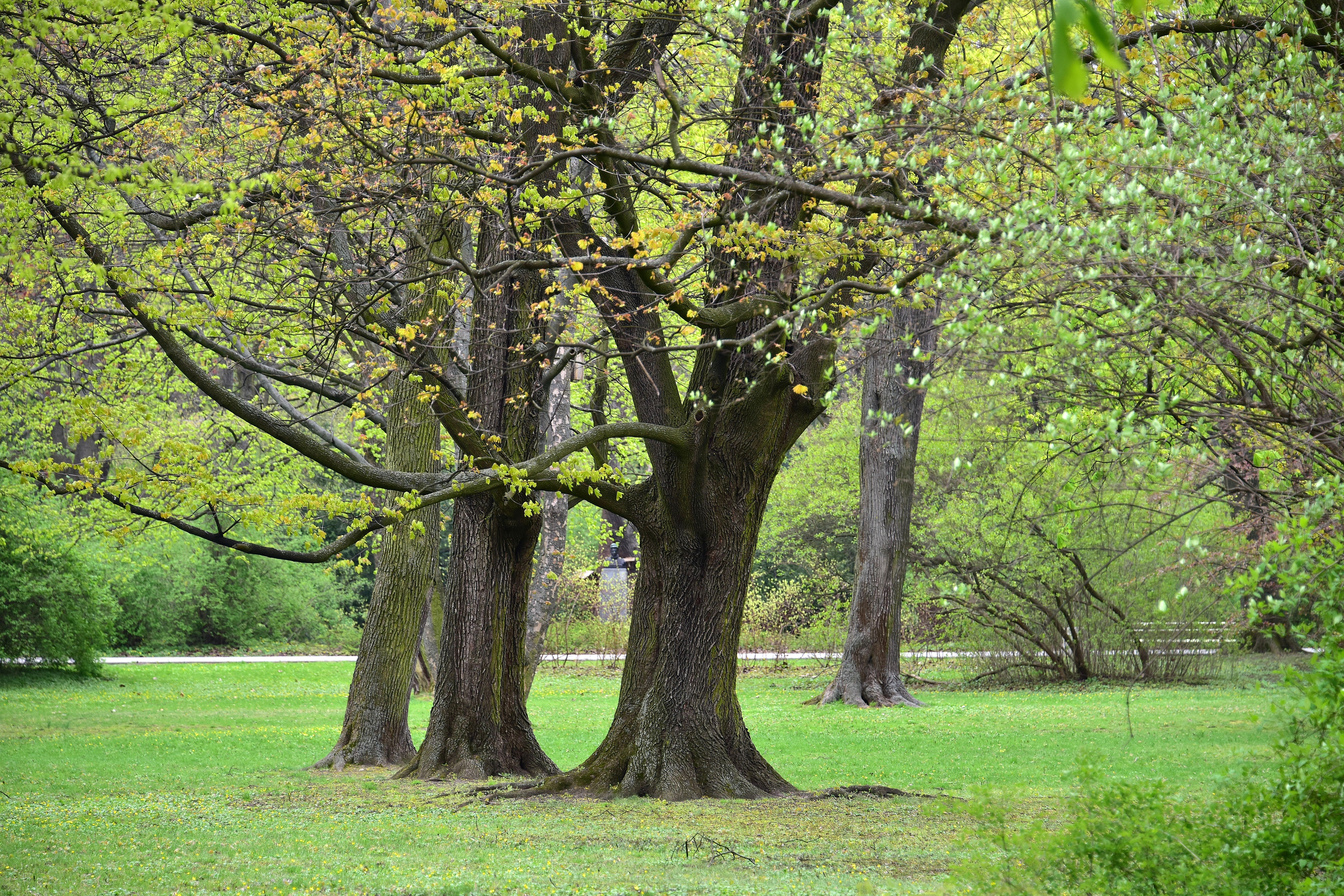 Park Praski im. Żołnierzy 1 Armii WP w Warszawie